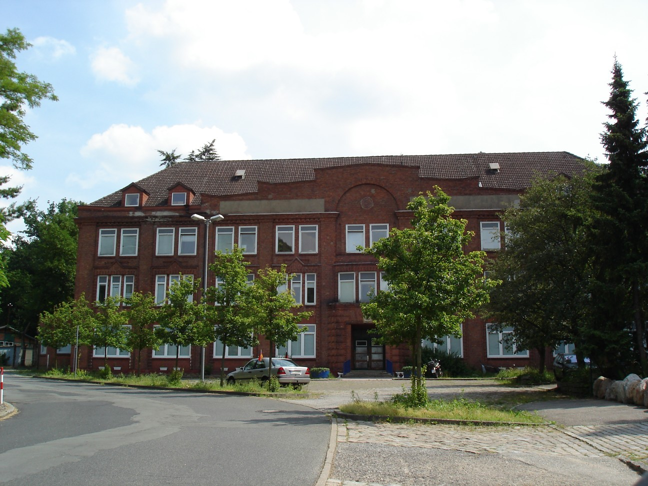 Verwaltungsgebäude der ehemaligen Dynamitfabrik Krümmel. Erbaut 1922 wurde es in den 1950er Jahren zu einem Wohngebäude umgebaut.